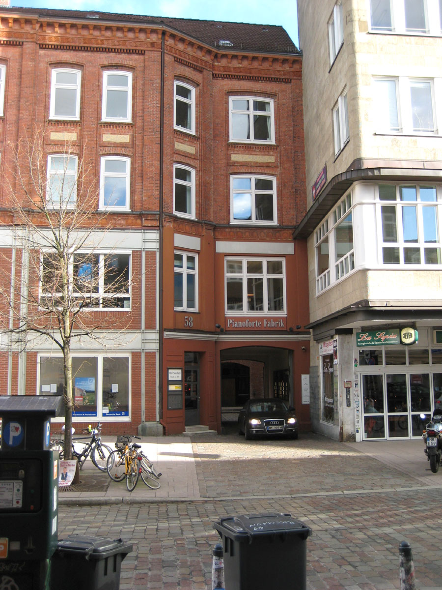 Haus Schulterblatt 58